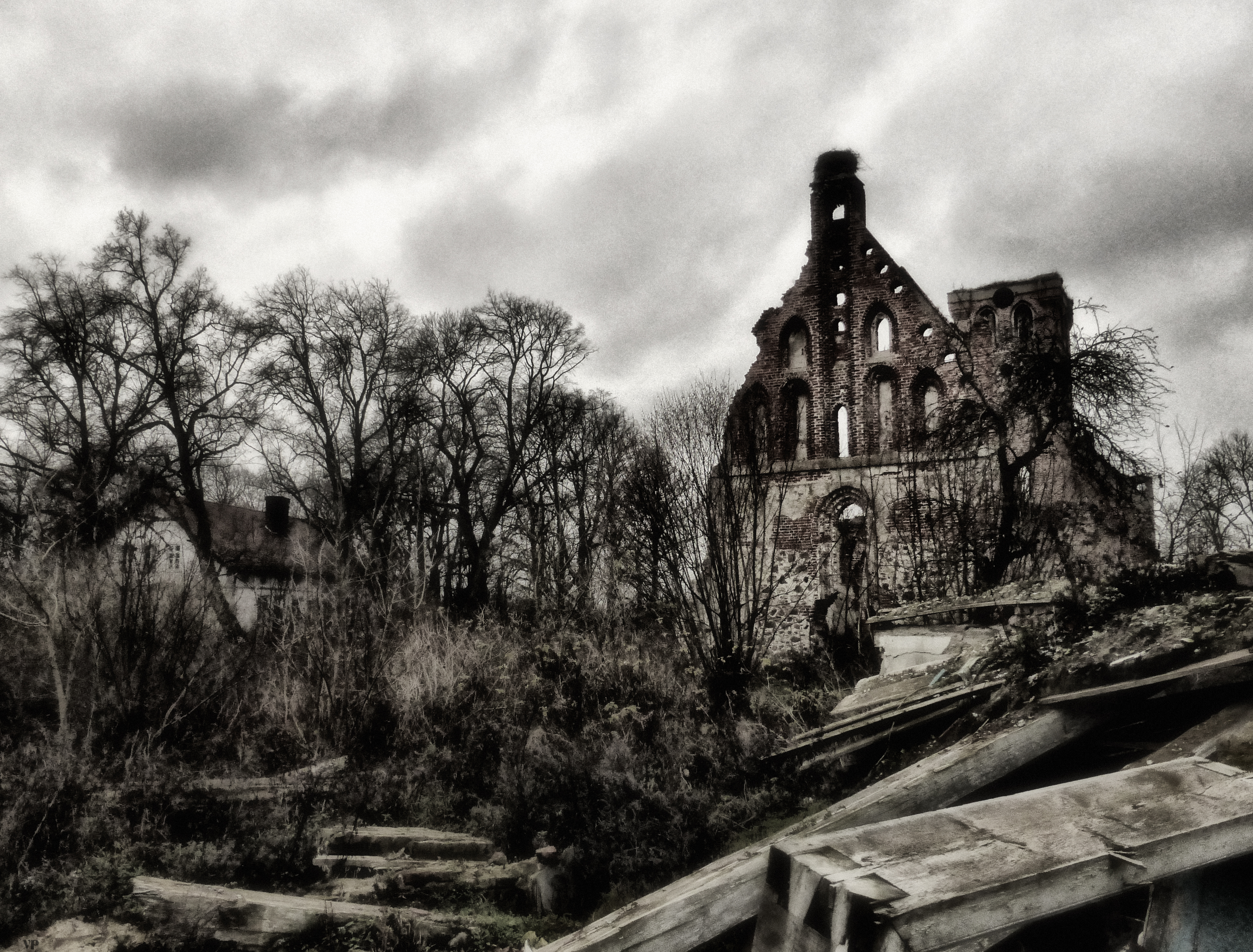 Die Kirche Powunden